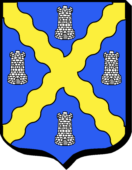 Armes : d’azur, à un sautoir d’or en ondes, accompagné de quatre tours d’argent maçonnées de sable.